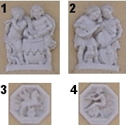 Bildhauerschmuck von Josef Zeitler am Konzerthaus Heidenheim. Zweimal zwei gleiche musizierende Puttenpaare über der Terrasse des Eingangsvorbaus (1-2). Je zwei Terrakottaplaketten (3-4) über den fünf Portalen des Eingangsvorbaus. Legende 1 Flötenspieler und Trommler mit Vogel 2 Lauten- und Cellospieler mit Eule 3 Pegasus springt über eine Lyra 4 aulosspielender Faun mit Riesenmaske und Ziegenbock.